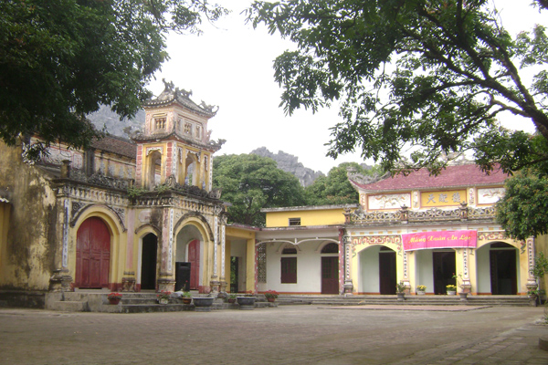 Chùa Tiên thuộc Xã Nga An - huyện Nga Sơn - Thanh Hóa - Việt Nam (Tien pagoda)